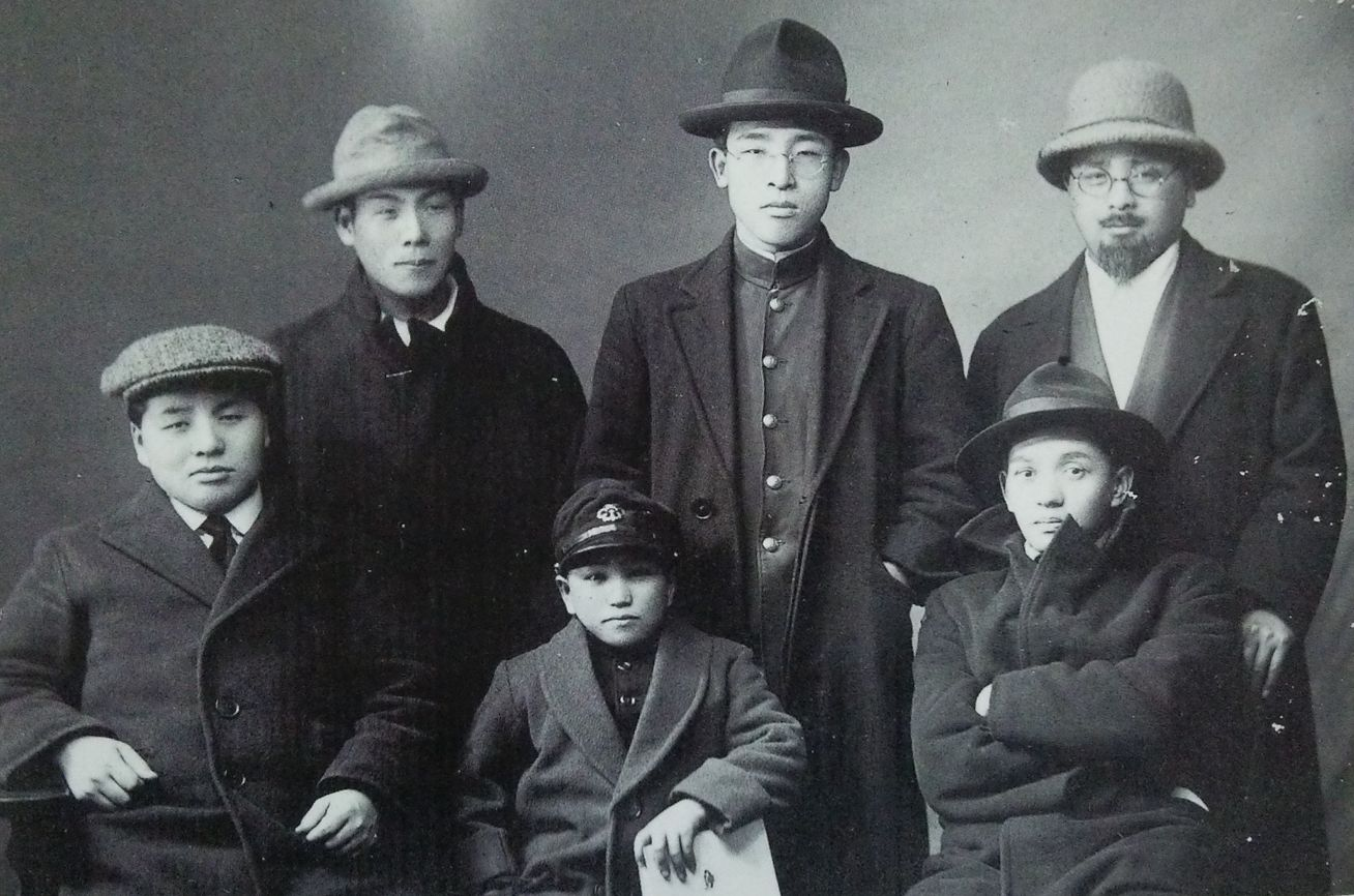 全国水平社第3回大会の記念写真。左から、米田富、阪本清一郎、山田孝野次郎、柴田啓蔵（確実でない）、西光万吉、松本治一郎。